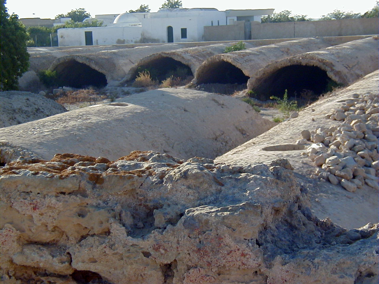 Citernes de La Malga, Carthage (tunisie)